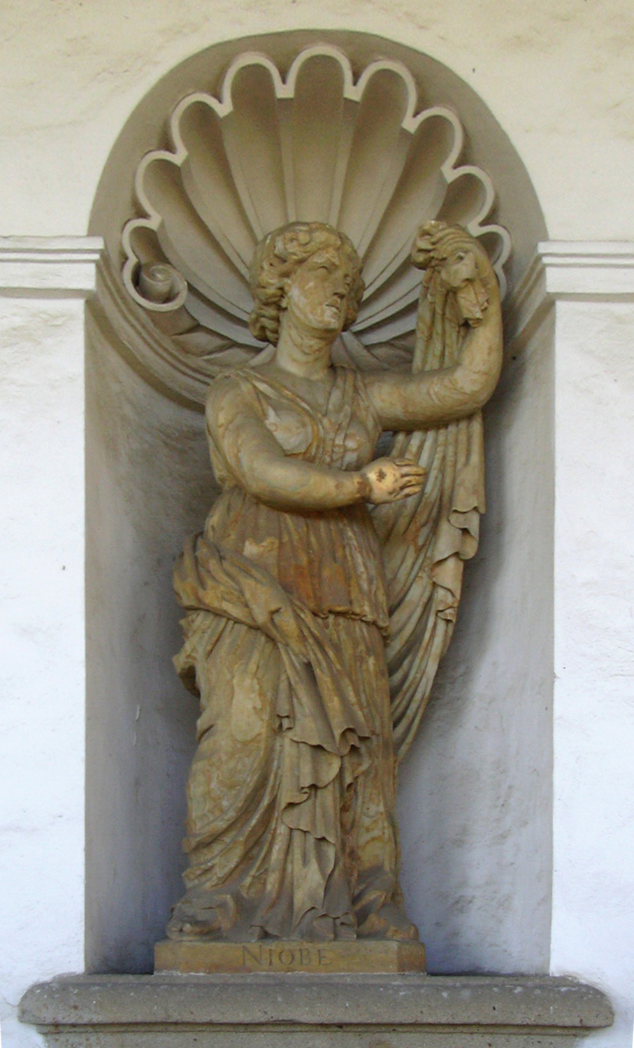 Niobé - socha Kroměříž Květná zahrada